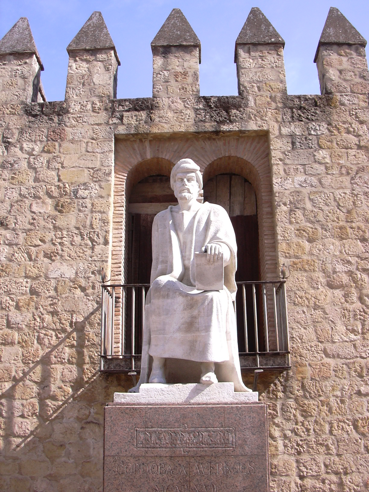 Statue d'Averroès à Cordoue, en Espagne.